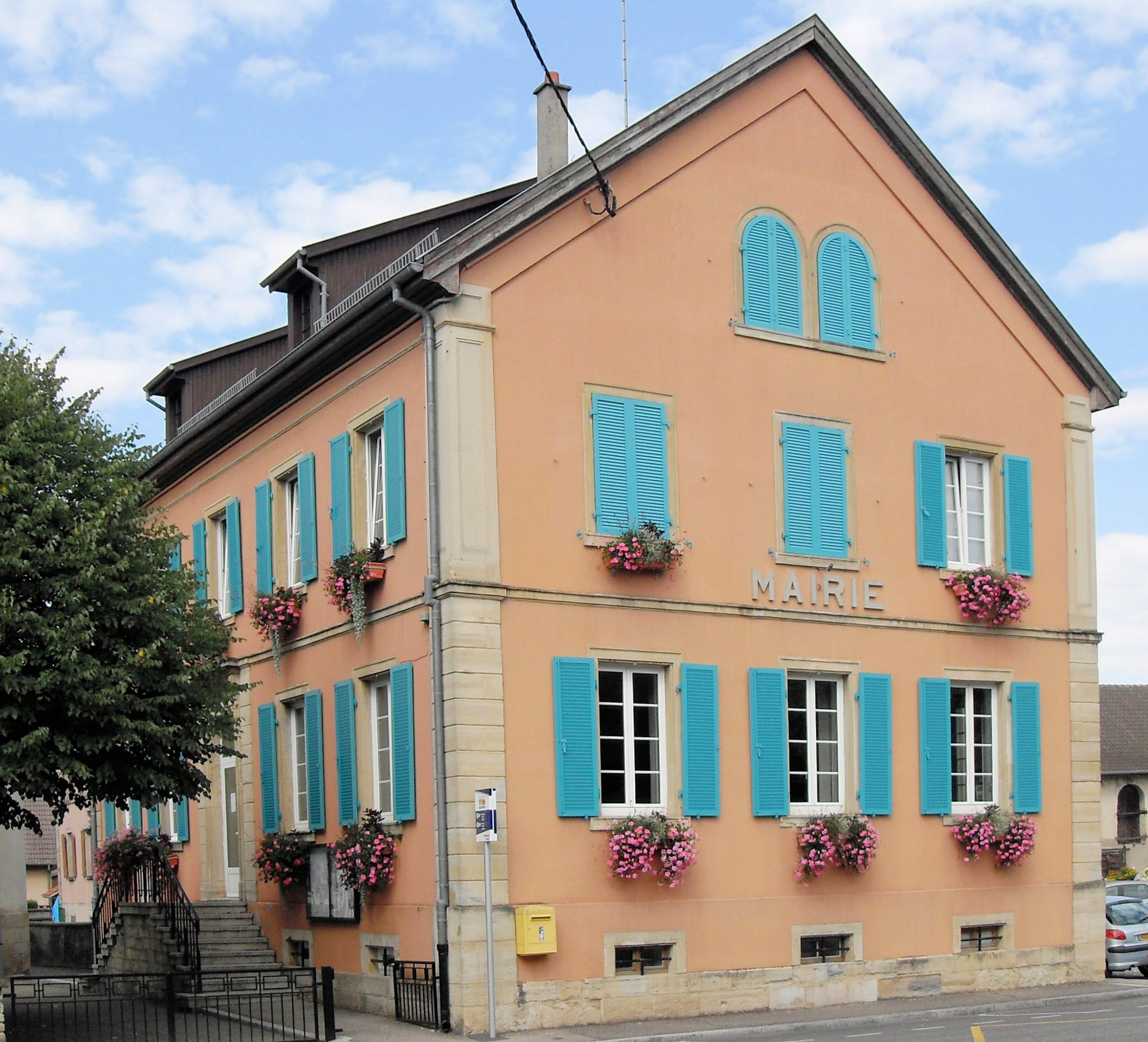 La mairie de Hirtzbach